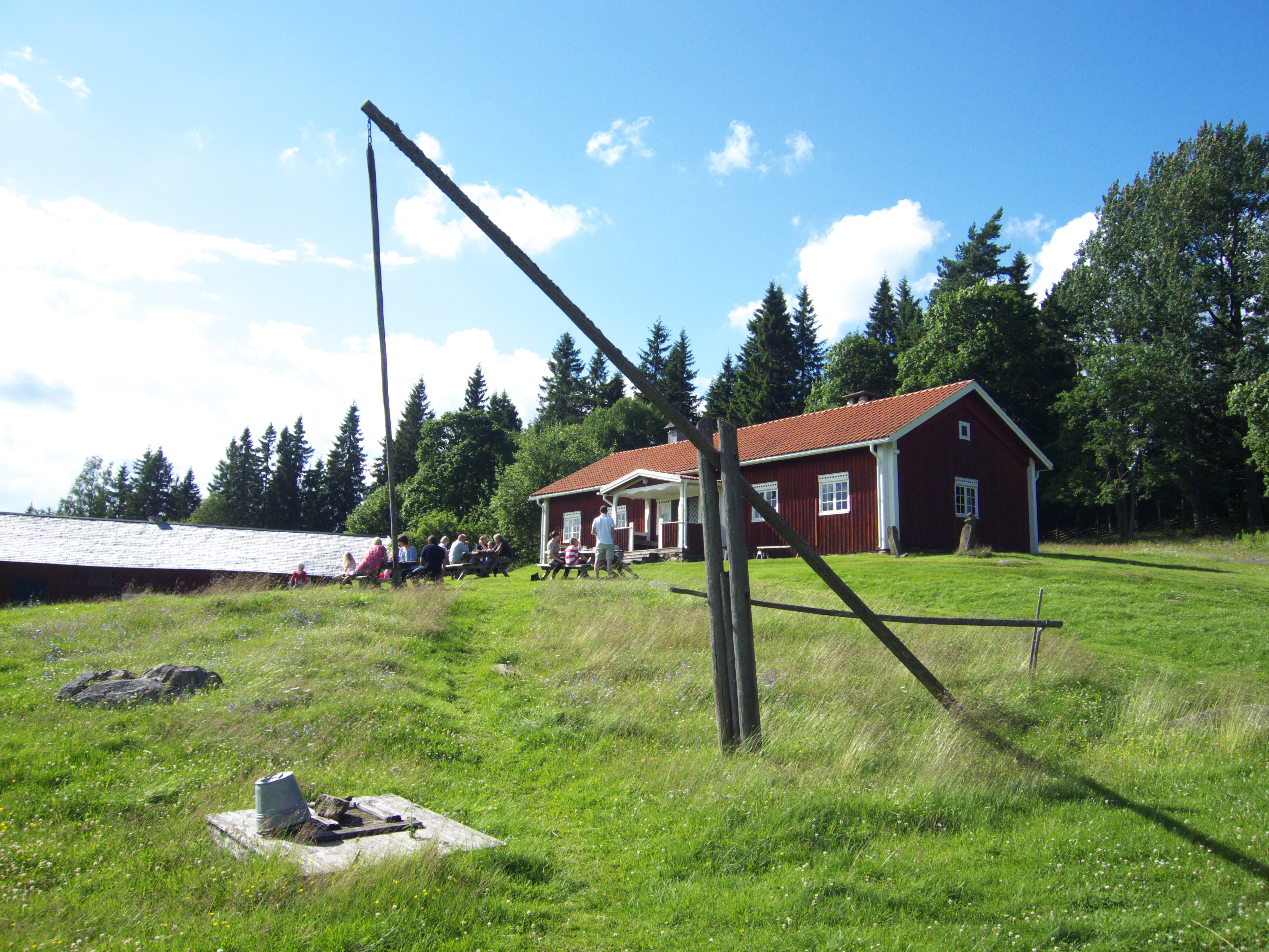 Finngården Kvarntorp i Lekvattnets socken